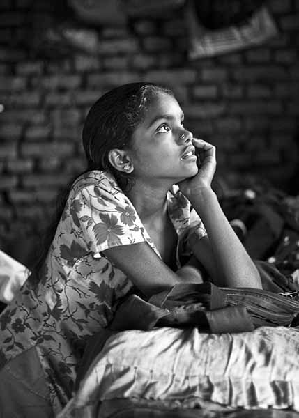 The Dreamer